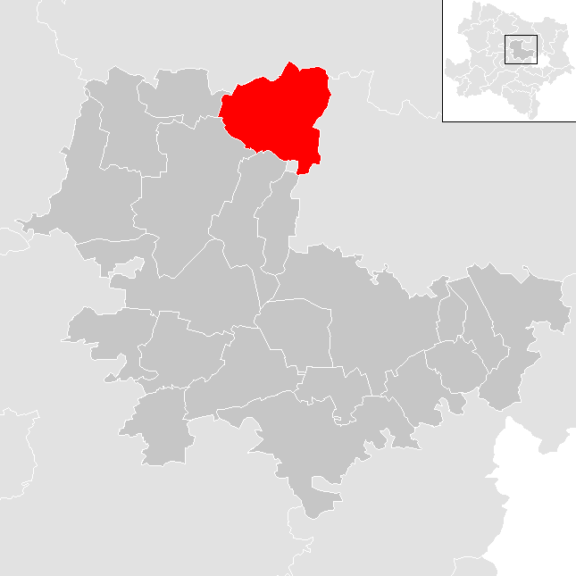 Bezirk Tulln